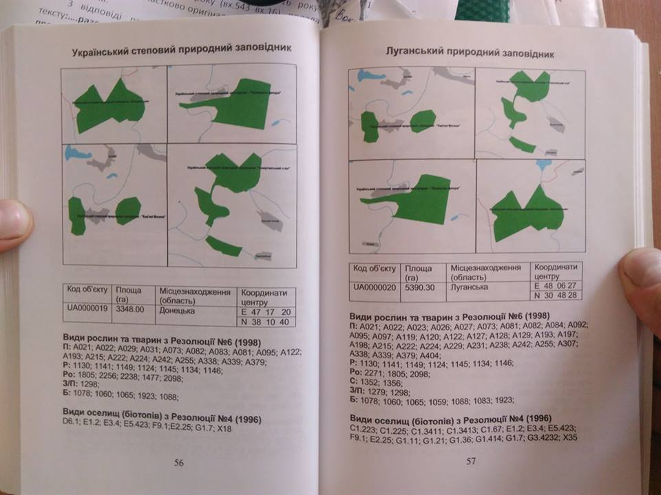 ілюстрація з книги Смарагдова мережа України, 2011